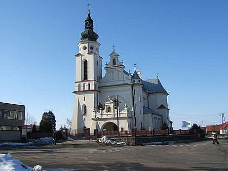 Kościół w Wójcinie pw. Katarzyny i Walentego